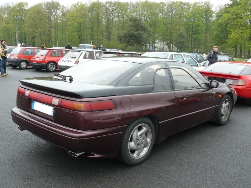 Français cadien: Montlhery Avril 2012